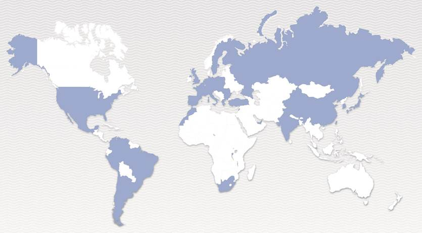 Implantation mondiale Edenred